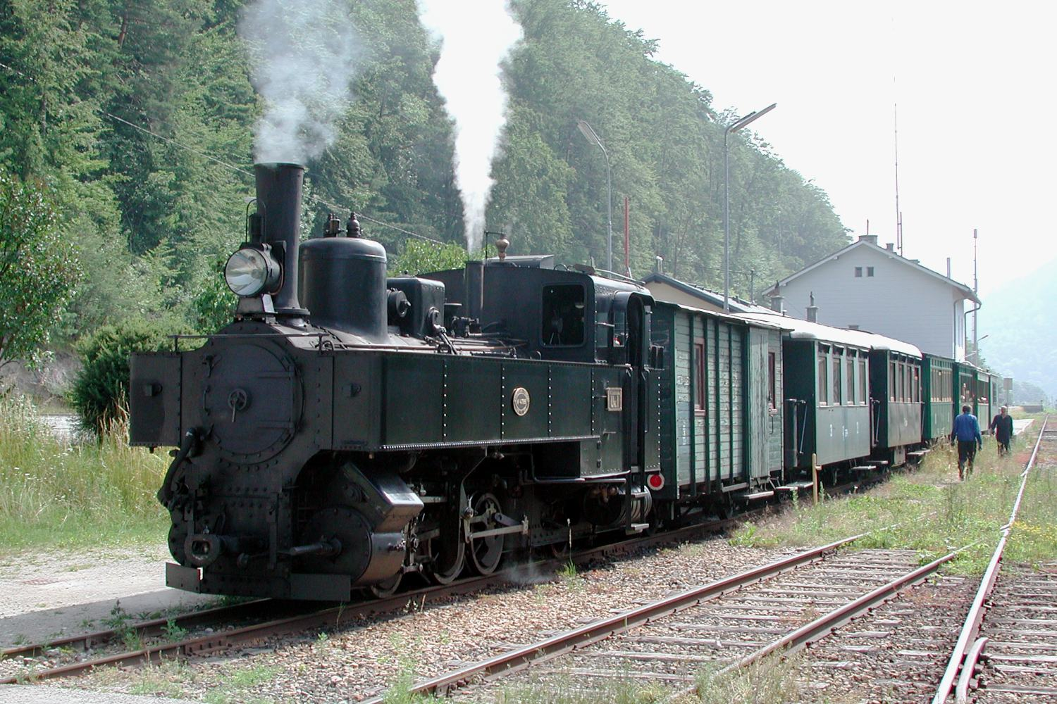 Niederösterreichische Landesbahnen Uv1 bzw. ÖBB 298.205 im Bahnhof Kienberg-Gaming, dem Ausgangspunkt der Museumsbahn "Ybbsthalbahn-Bergstrecke"